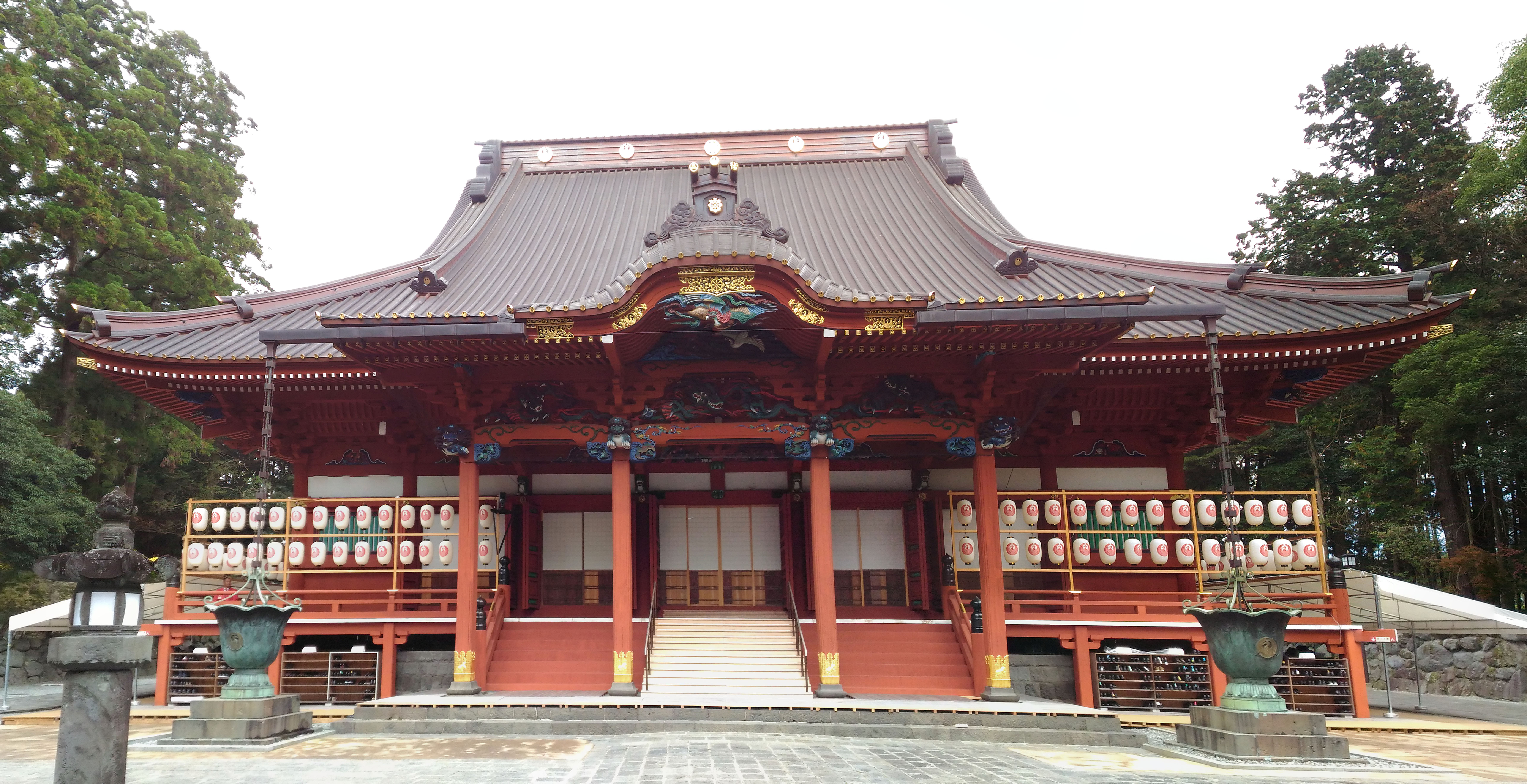 大石寺御影堂